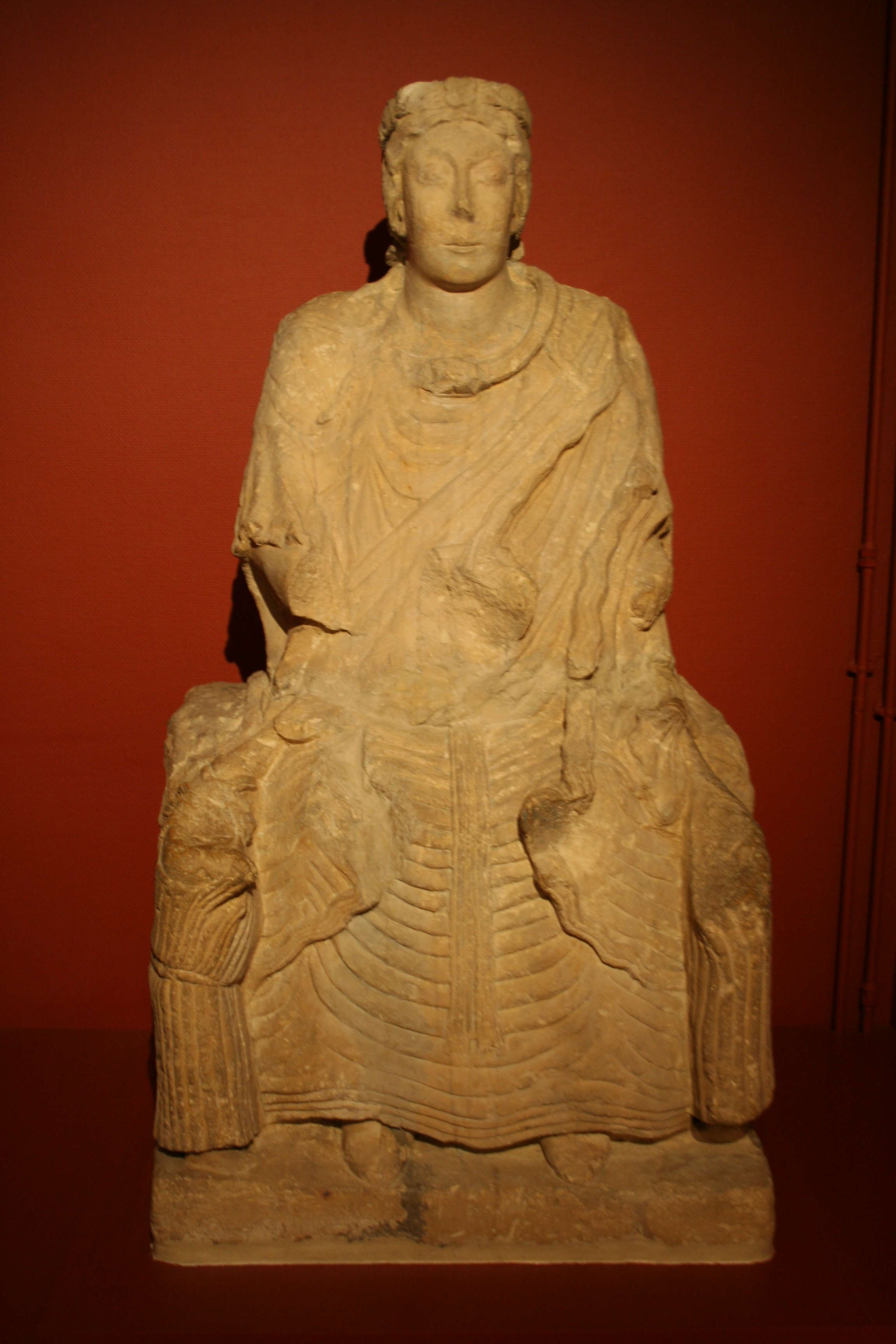 Déesse mère de St Aubin sur Mer, statue originale au Musée de Normandie à Caen